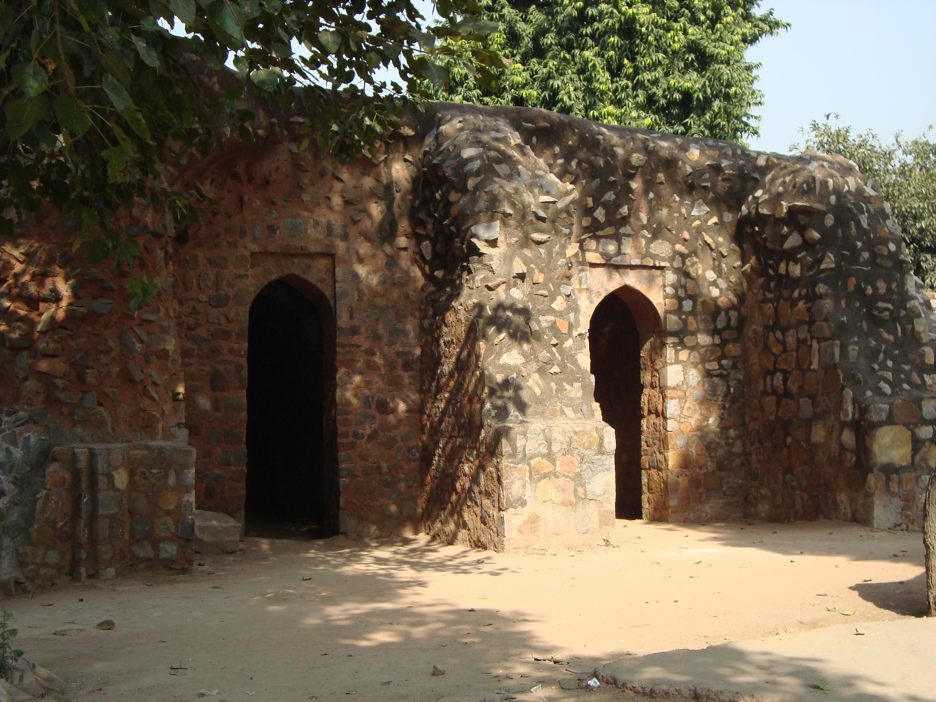 ഹുമയൂണിന്റെ ശവകുടീരസമുച്ചത്തിലെ അറബ് സെറായ് കവാടത്തിനു പിന്നിലെ മതിൽ.Unknown wall behind arab serai gate of humayuns' tomb complex, new delhi, india